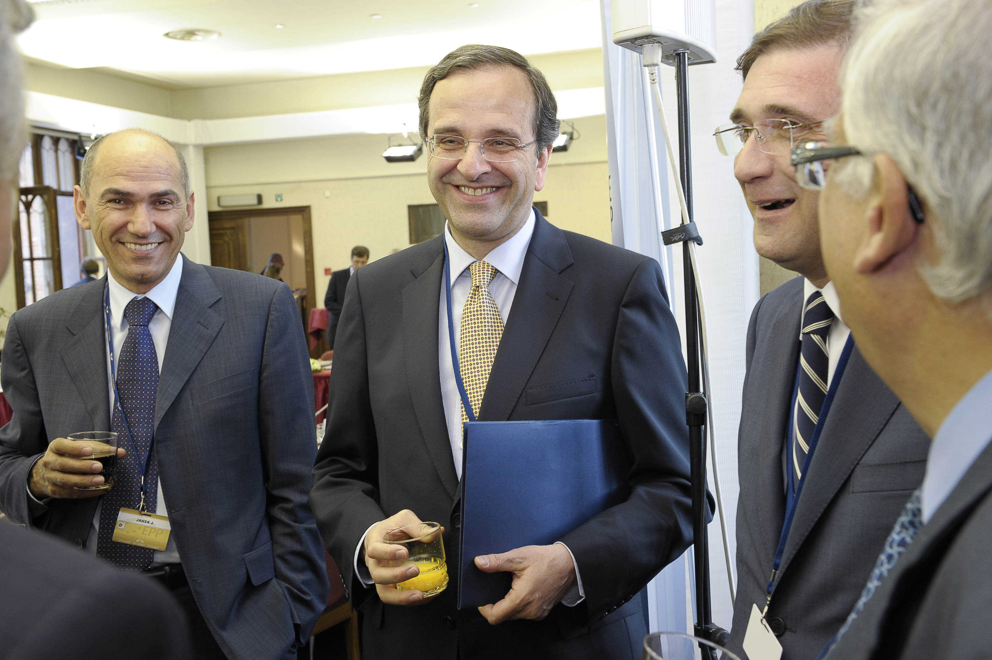 EPP Summit June 2010